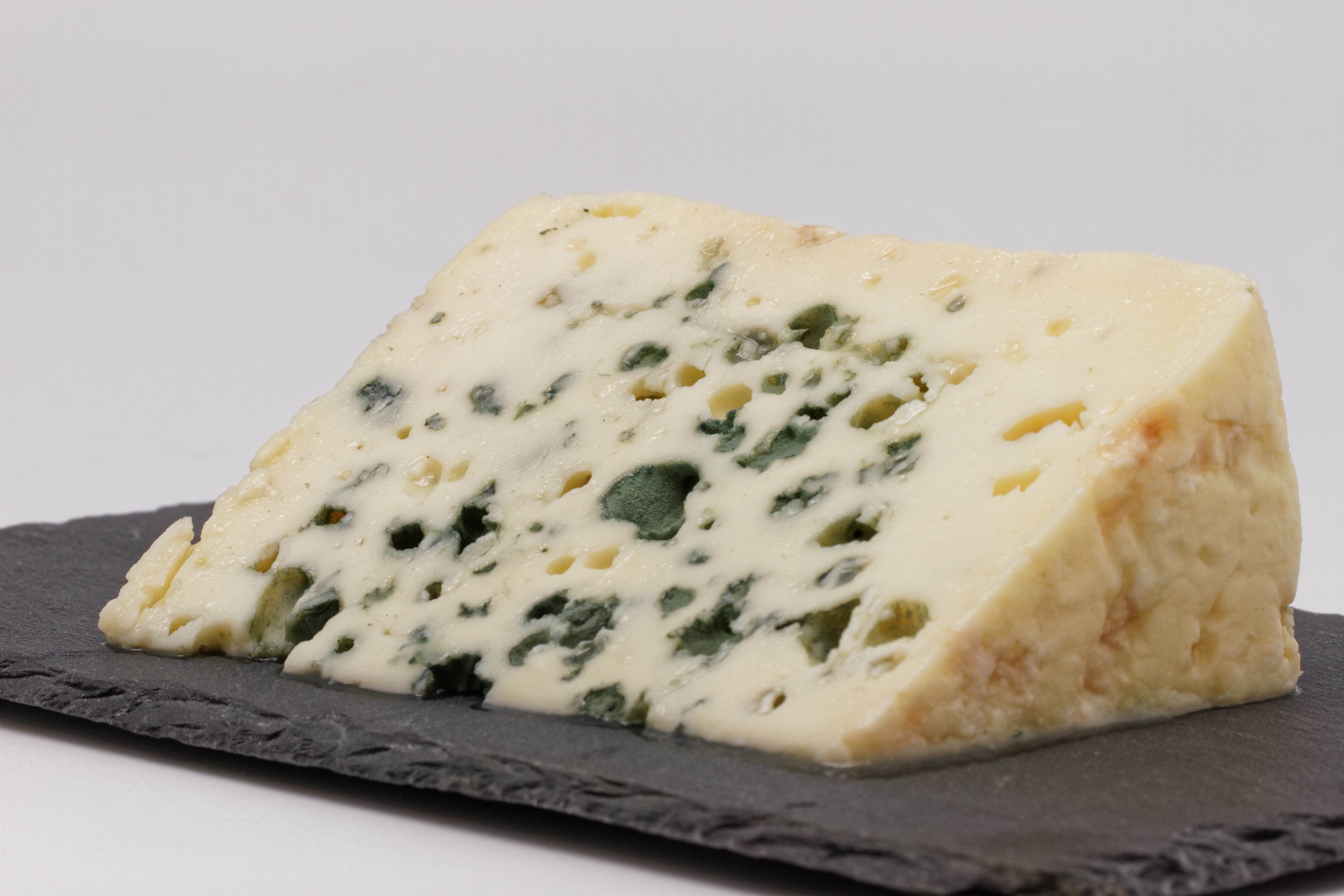 Du Roquefort, fromage de l'Aveyron.